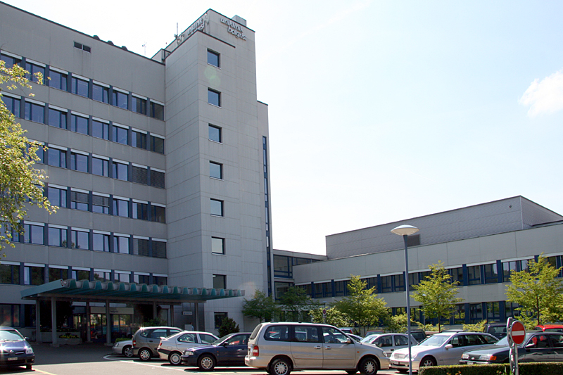 Uniklinik Balgrist, Zürich-Weinegg